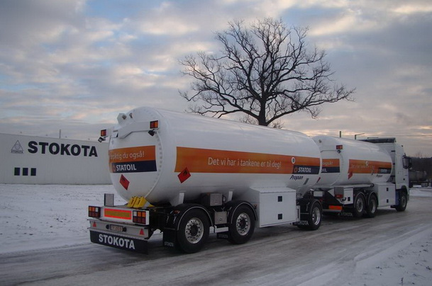 Полуприцеп-цистерна для транспортировки газа (СУГ)